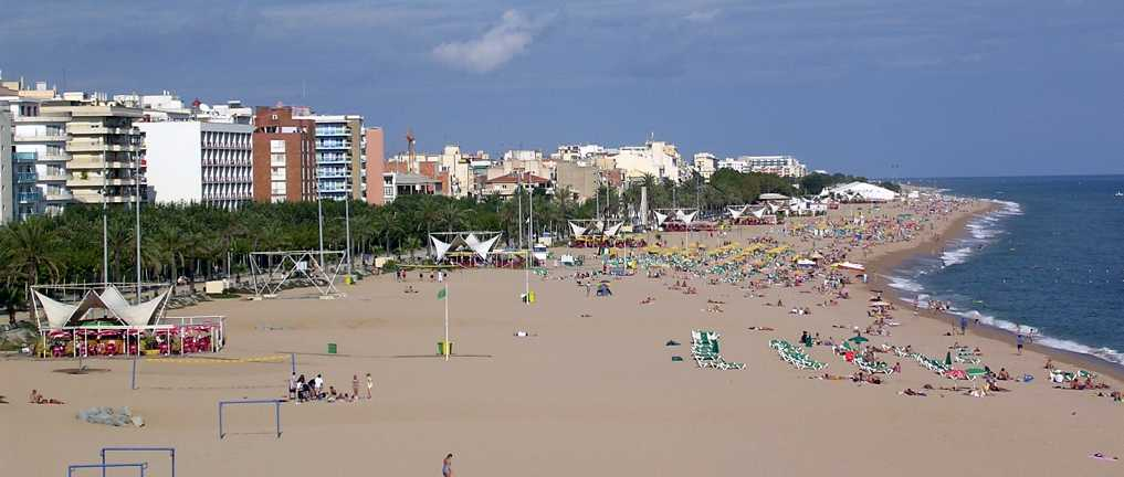 Панорама пляжа